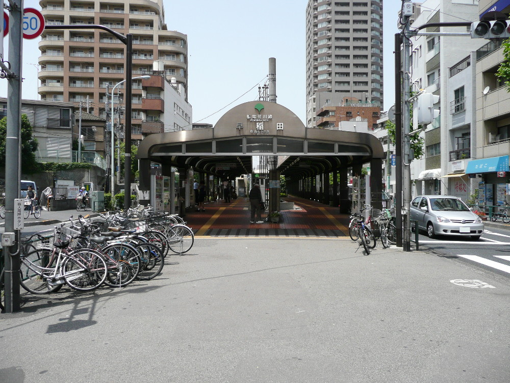 都電早稲田駅入口